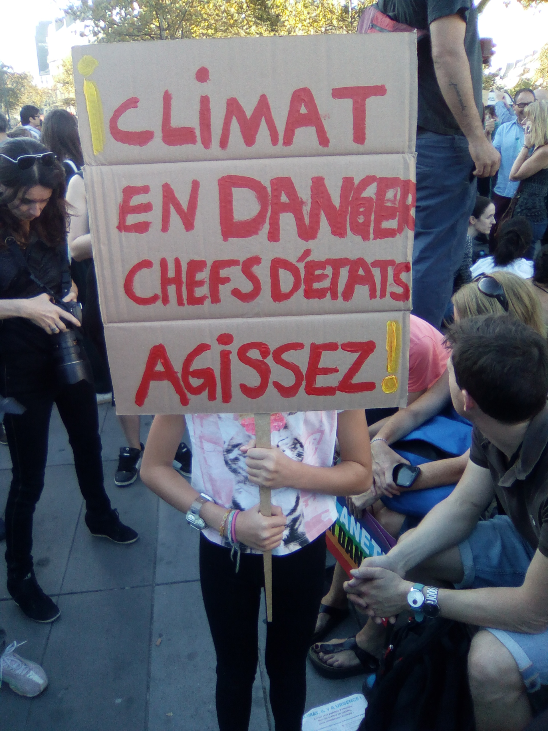 Marche pour le climat à Paris (arrivée place de la République).